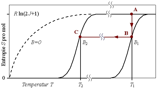 Temperatur-Entropie-Kurven bei verschiedenen Magnetfeldern (schematisch).